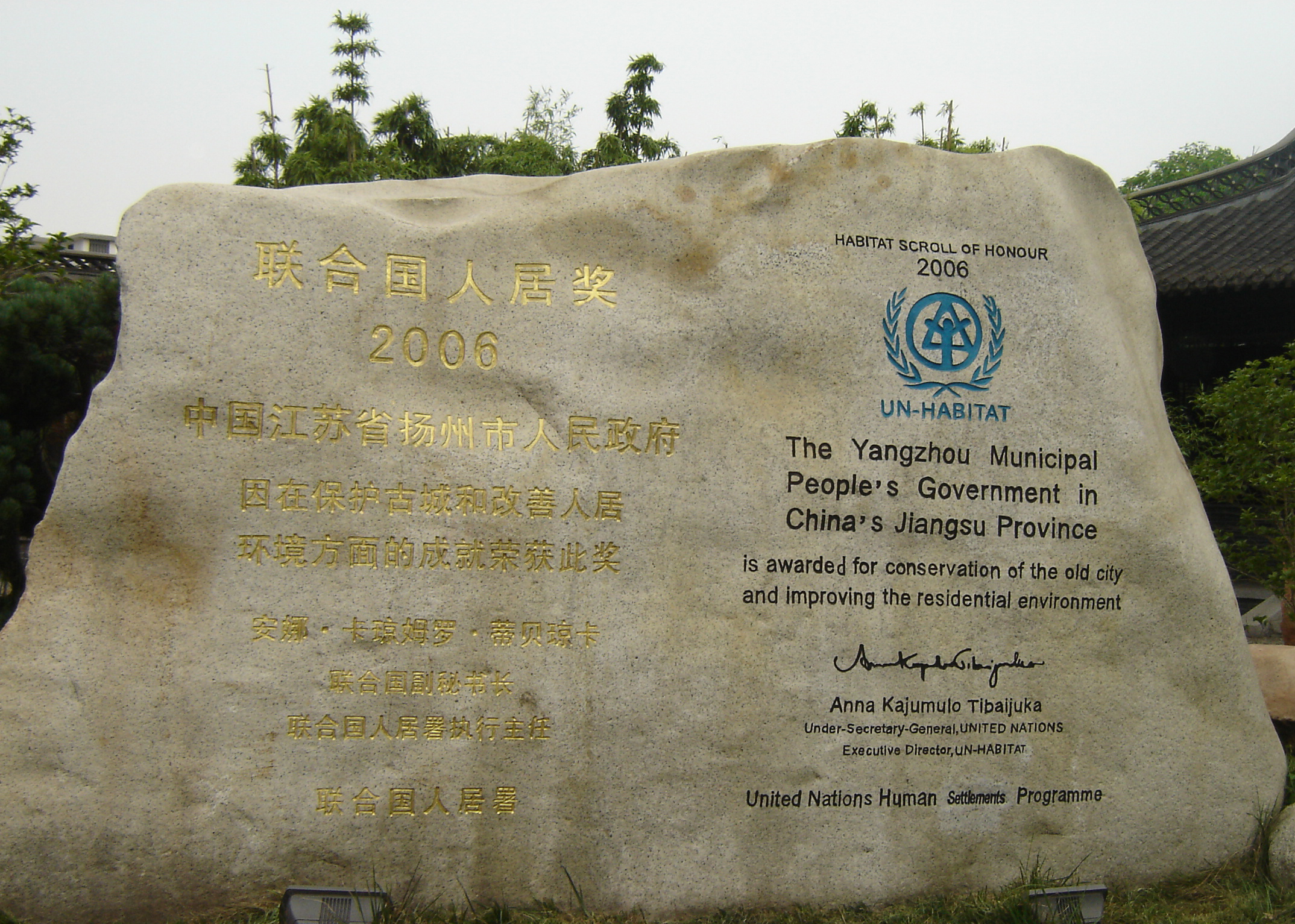 扬州市荣获2006年联合国人居奖